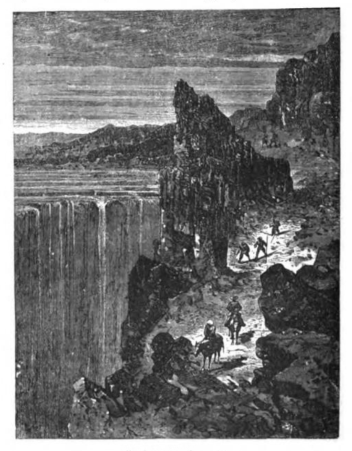 Vue des Andes